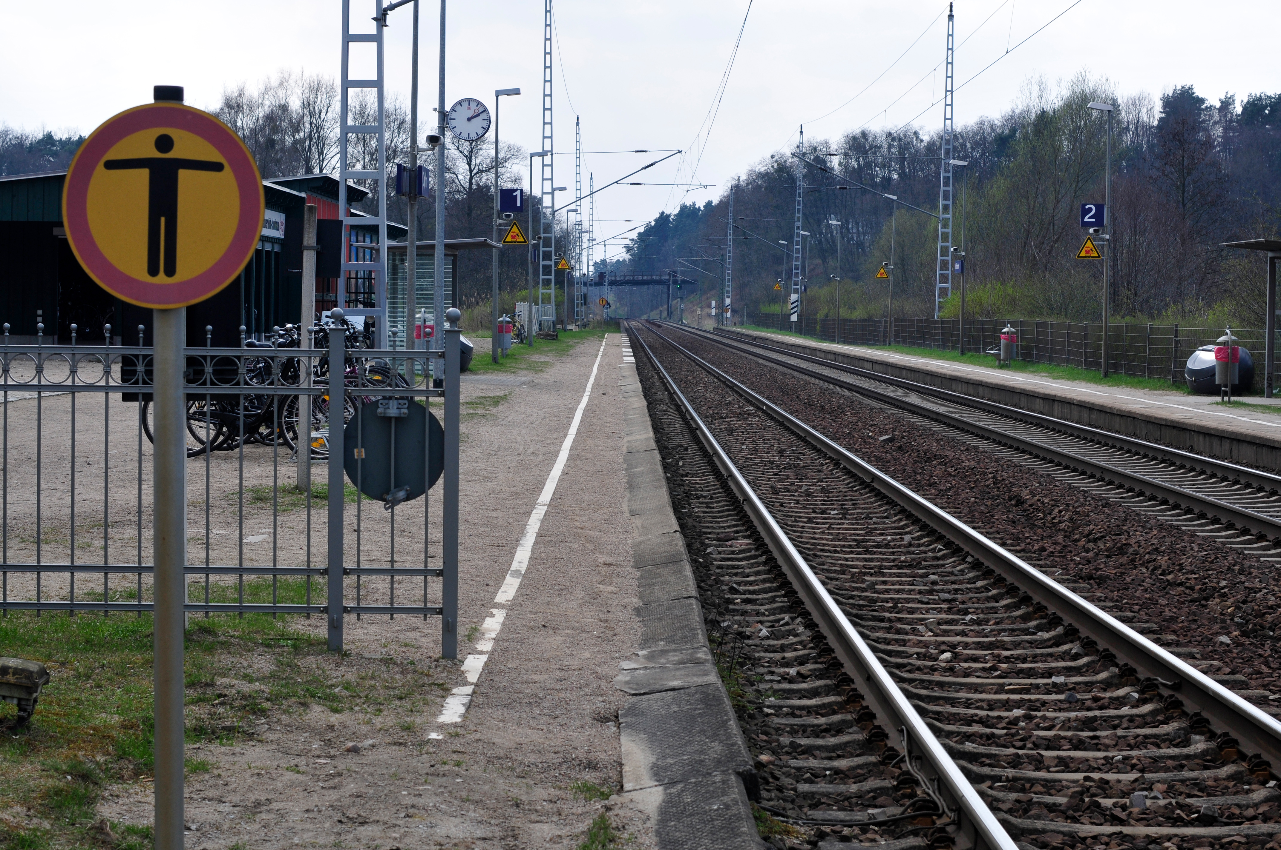 Chorin